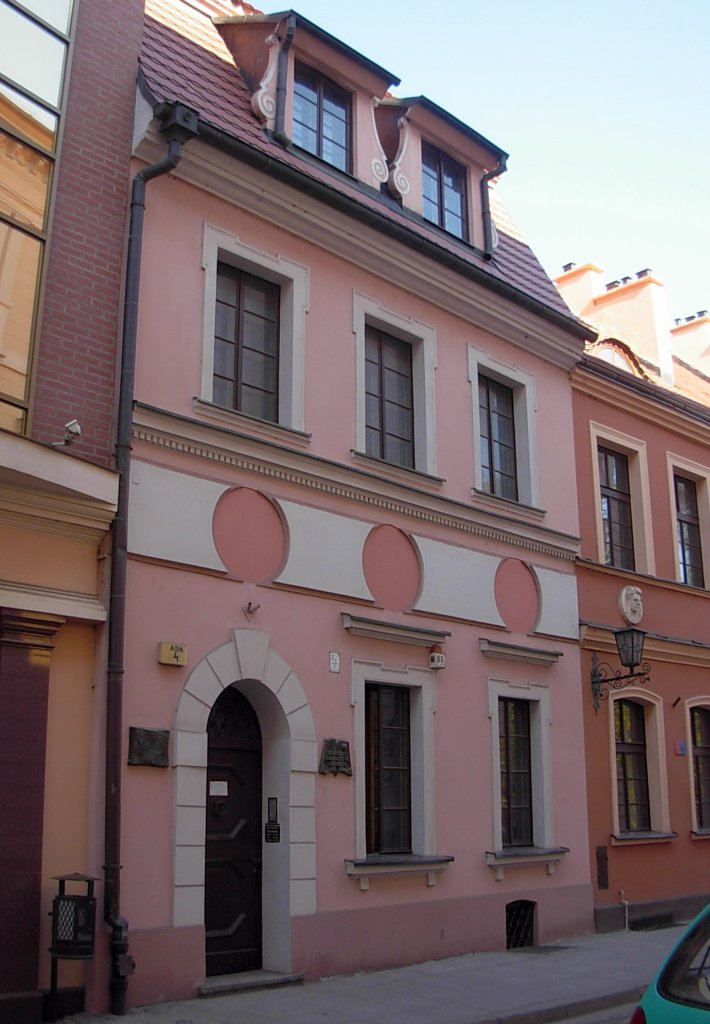 Kamienica Jezuicka 4 Bydgoszcz